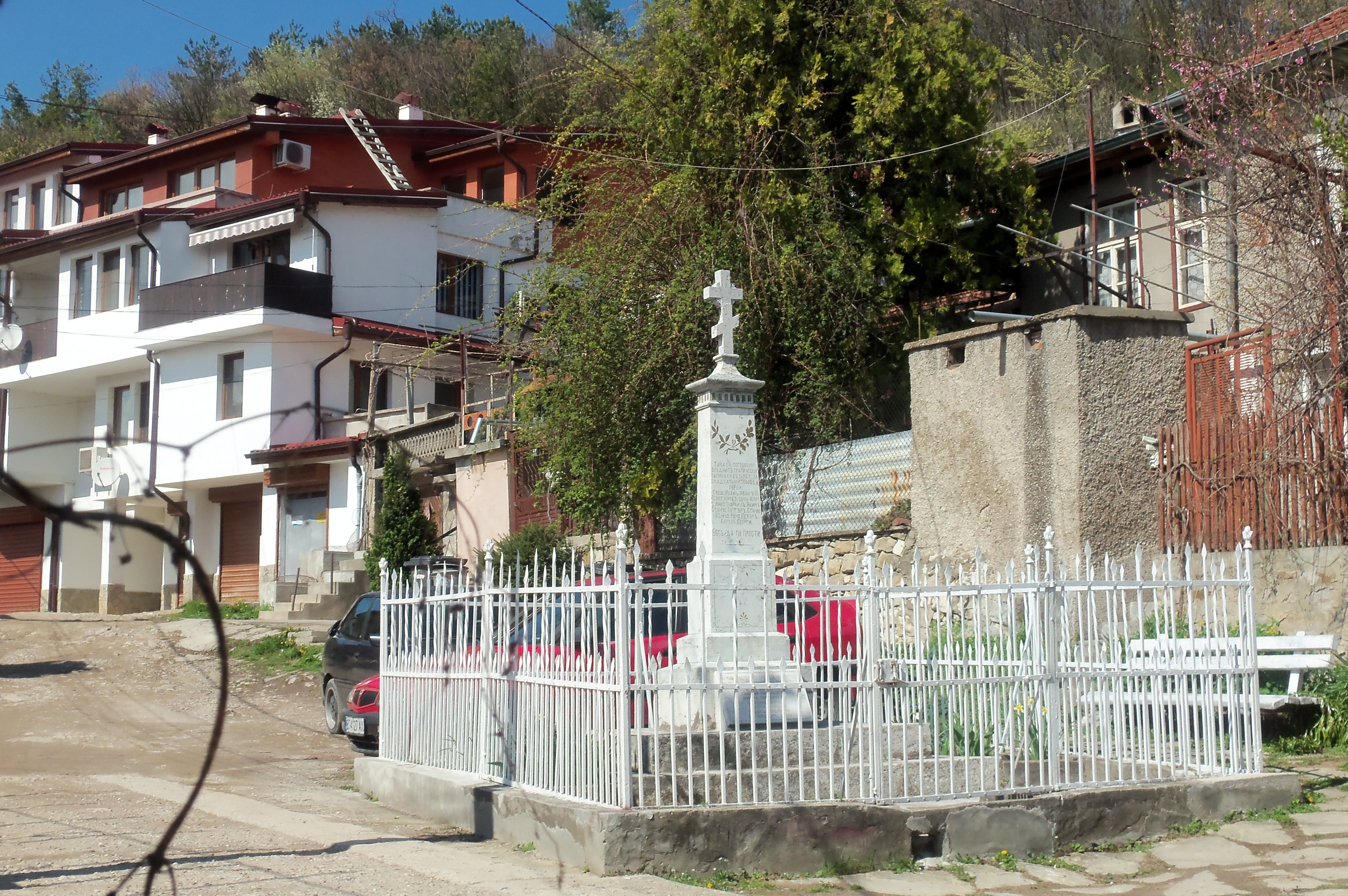 Паметник на загиналите за освобождението от османско владичество, квартал "Варуша север", Велико Търново